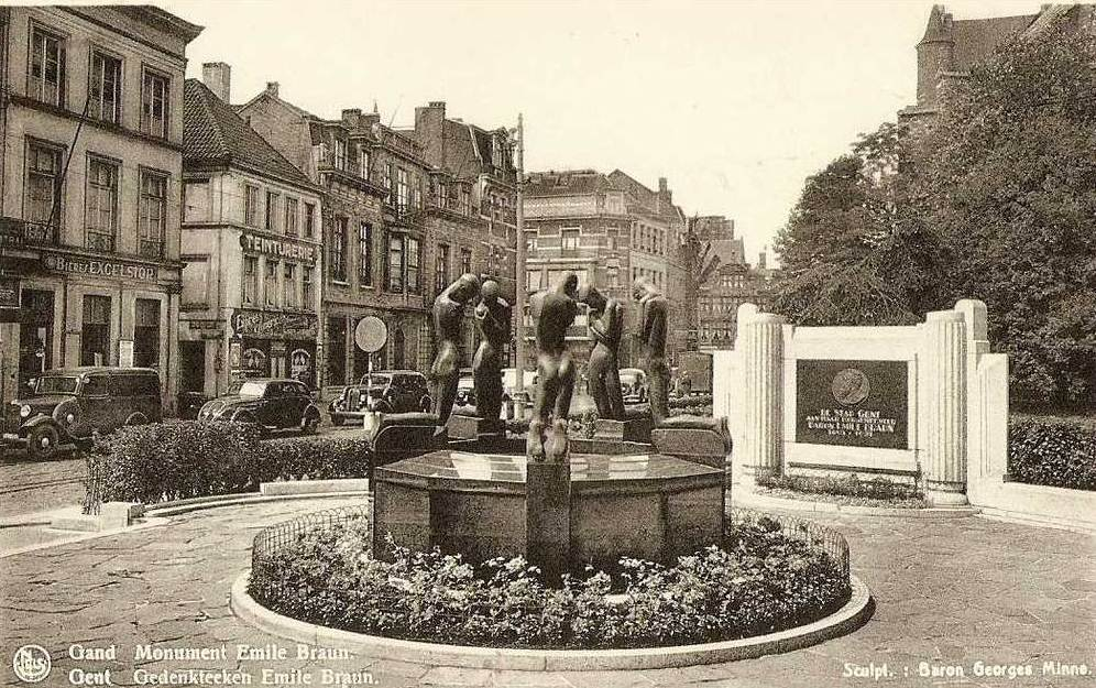 Le monument original à Emile Braun à Gand. Composé de la "Fontaine des Agenouillés" de Georges Minne et de la plaque commémorative au bourgmestre Braun.